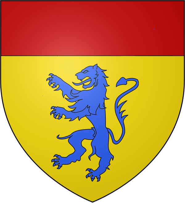 Blason de la Famille française Bohier